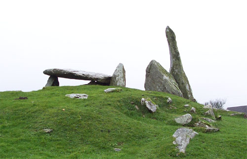 Cairn Holy II, Dumfries and Galloways (Scotland)